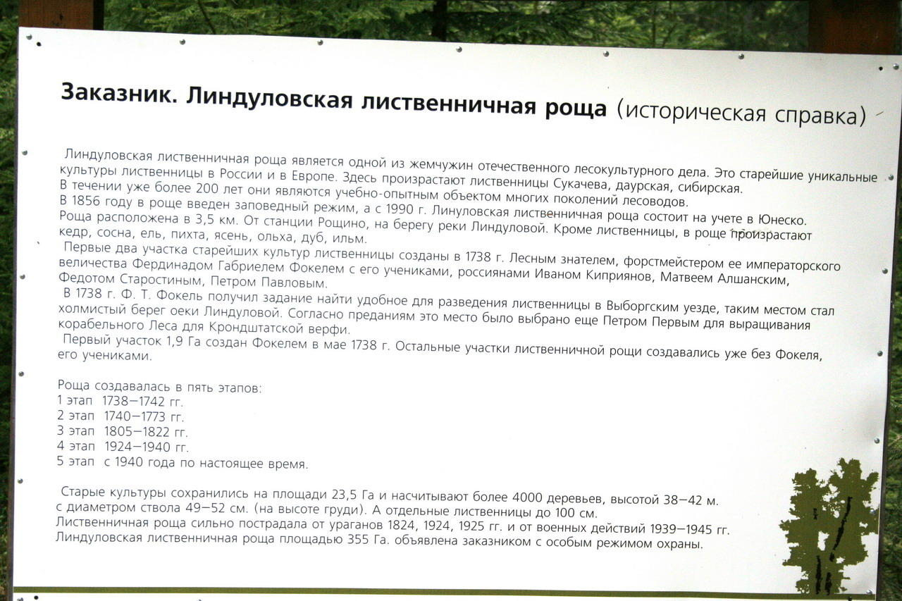 Линдуловская Роща.